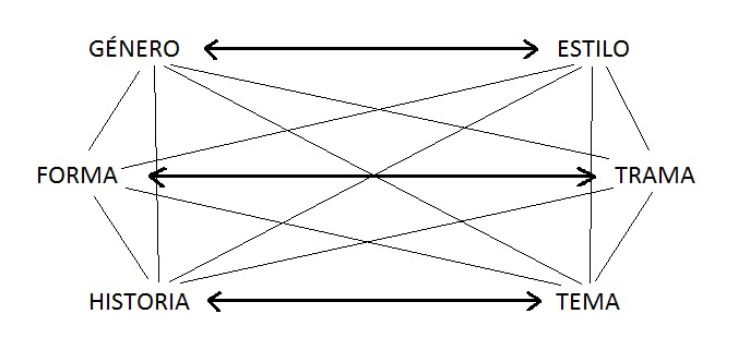 script, guion, contenido, content, estructura